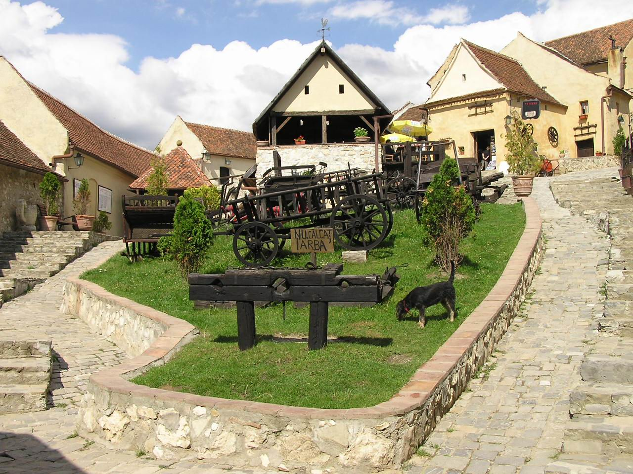 Innenhof der Rosenauer Burg (Râşnov)